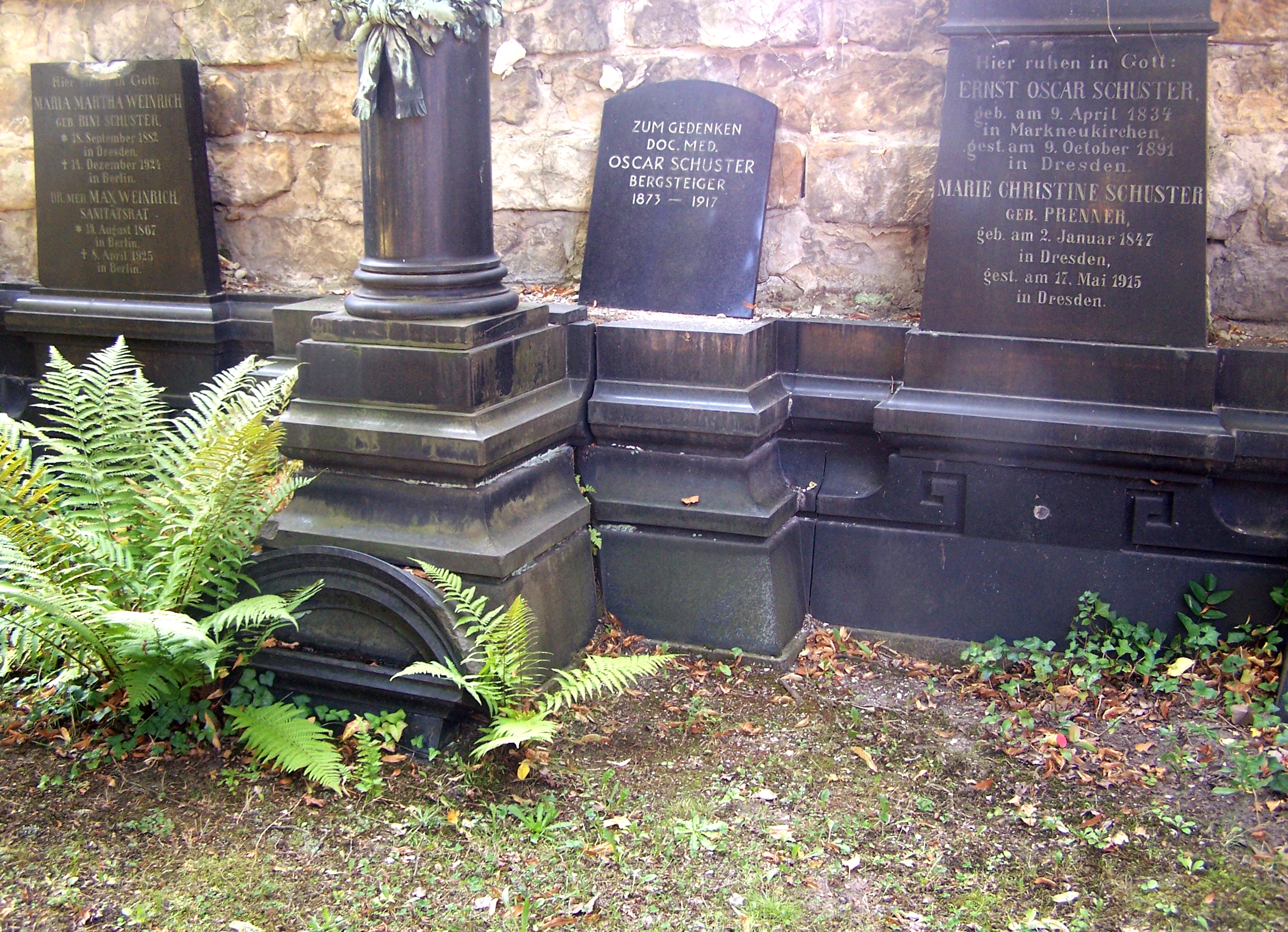 Familiengrabstätte Schuster auf dem Trinitatisfriedhof zu Dresden, mit Gedenktafel für den Bergsteiger Oscar Schuster